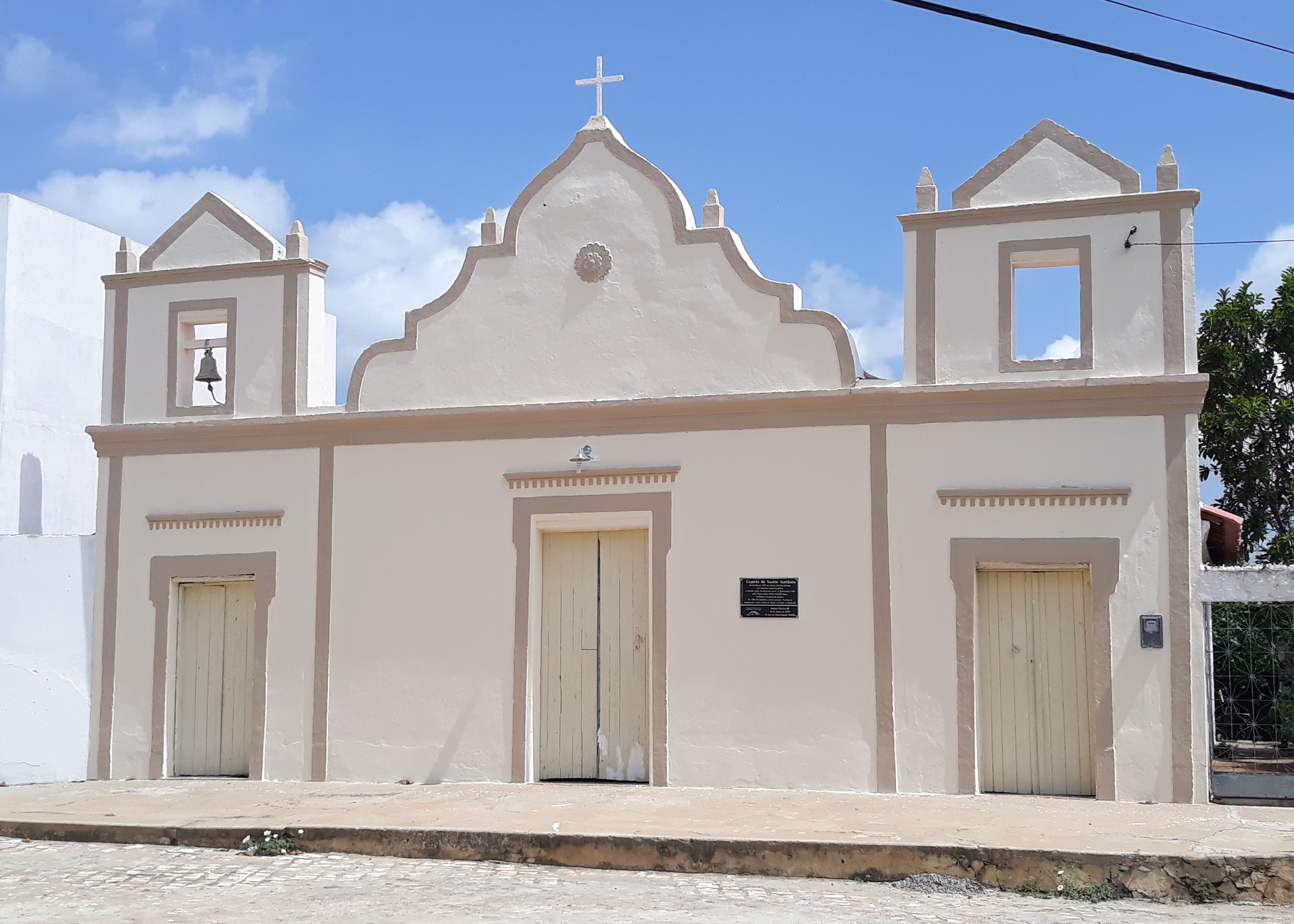 Antiga capela de Santo Antônio, construída em 1901, em Antônio Martins, Rio Grande do Norte (Brasil)